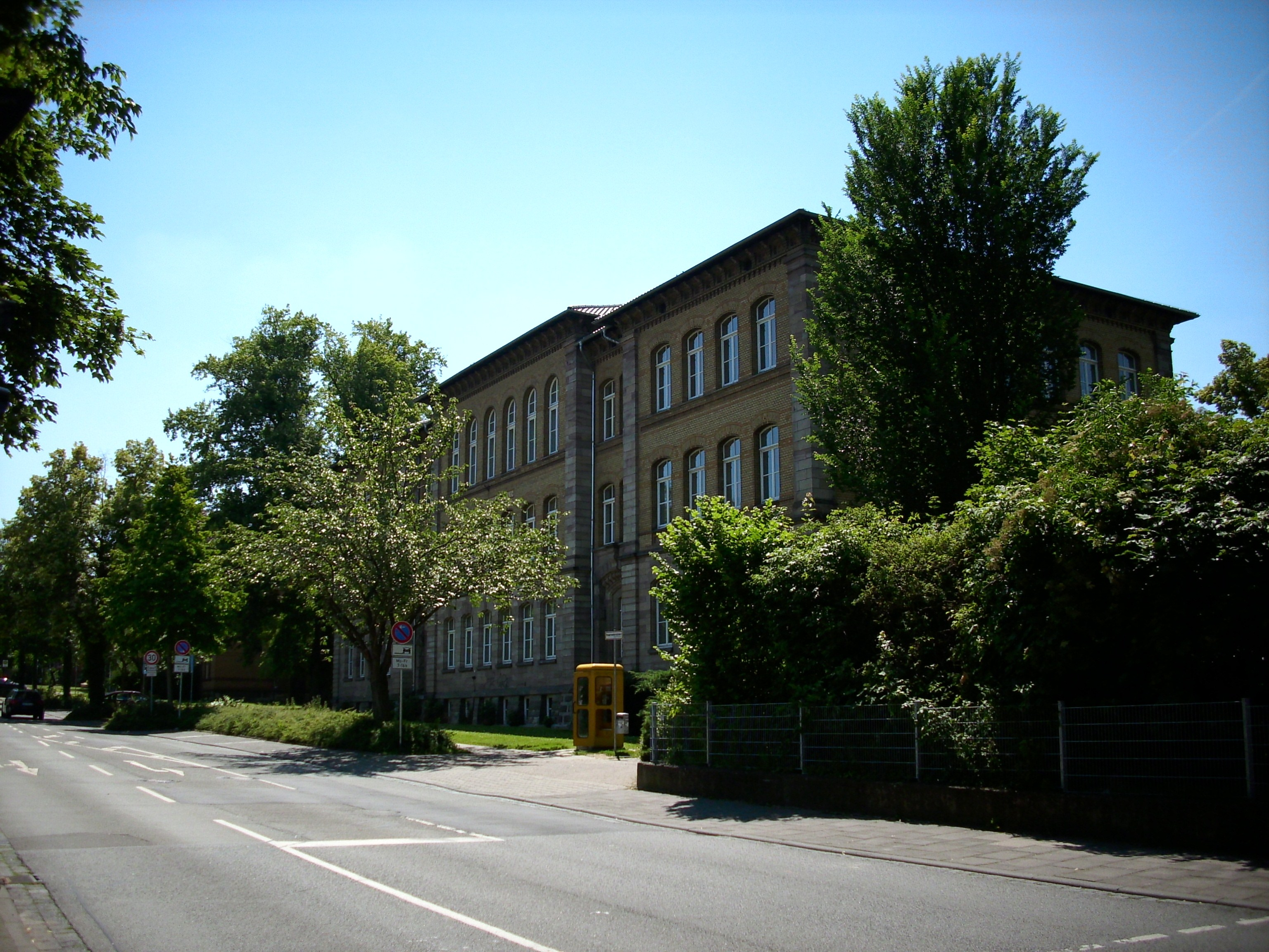 Hauptgebäude des Gymnasium Corvininaum Northeim.